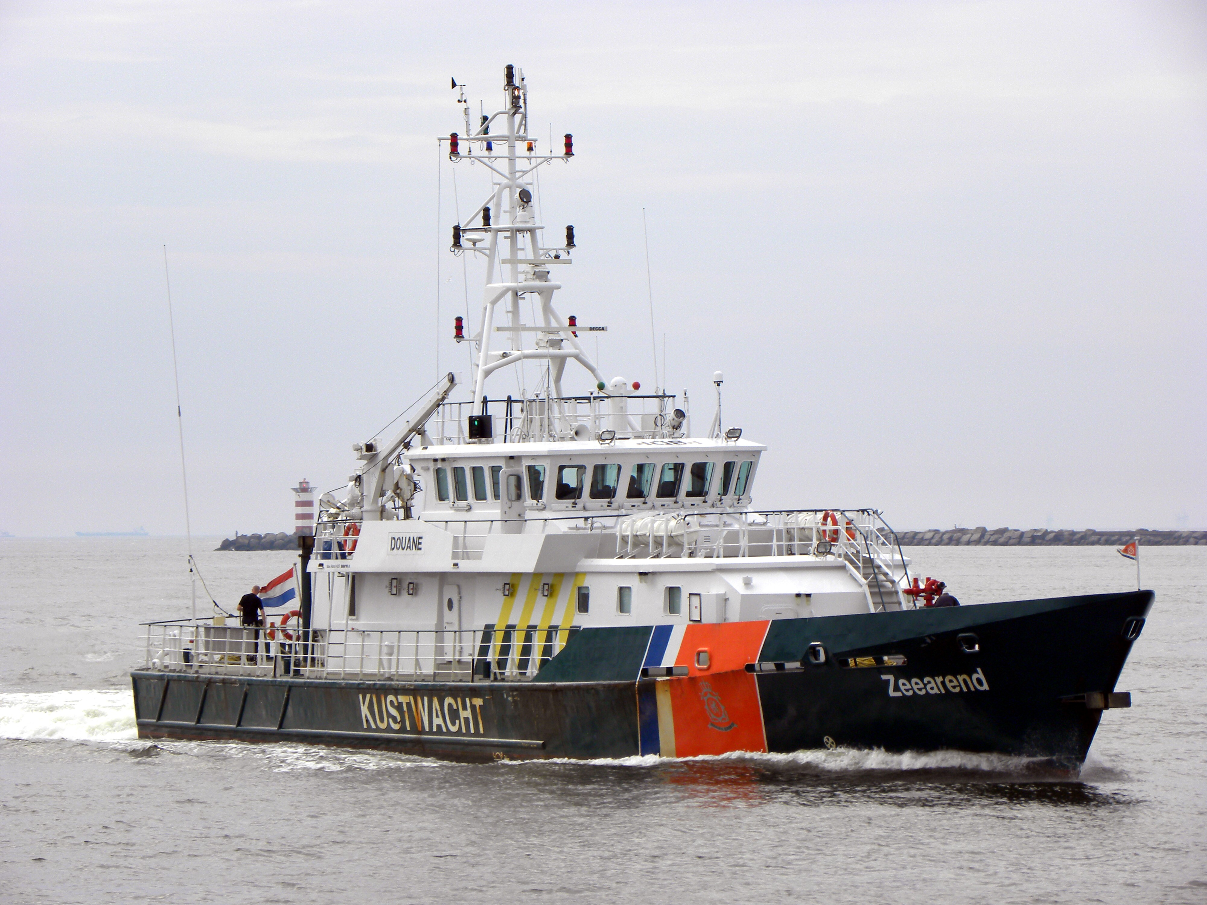 Zeearend - Hoek van Holland costoms vessel build 2002 in the netherlands